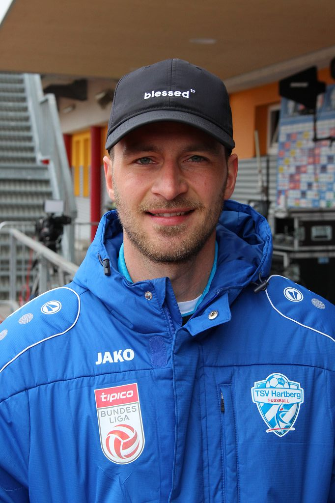 Tobias Kainz (Hartberg)